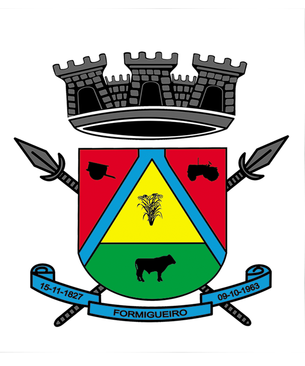 Brasão do Município de Formigueiro